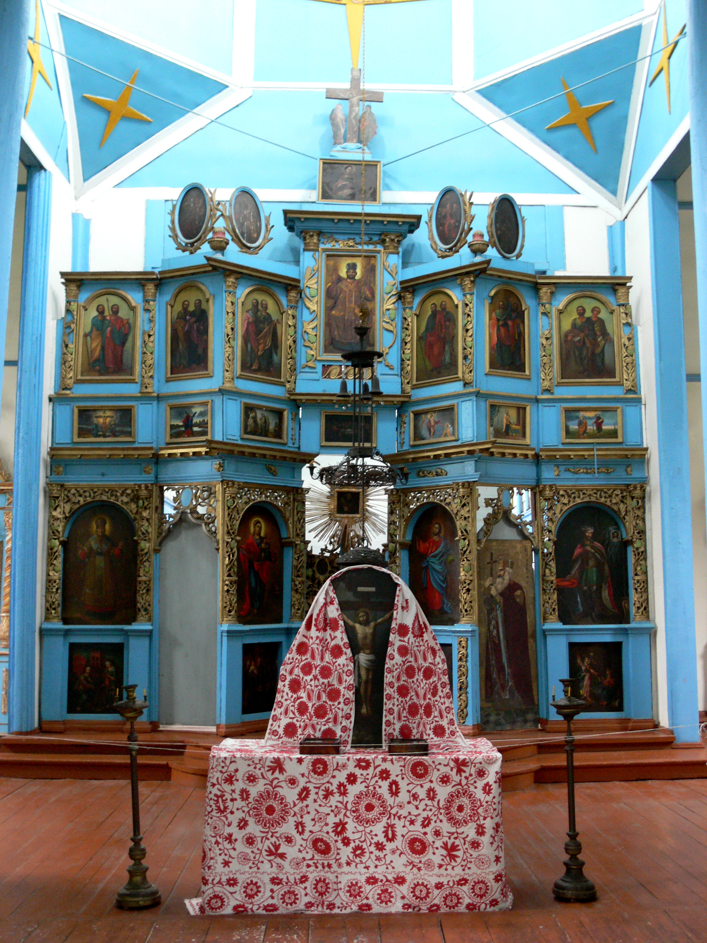 1. Інтер’єр Церква святого Георгія., Церква святого Георгія з с. Андруші